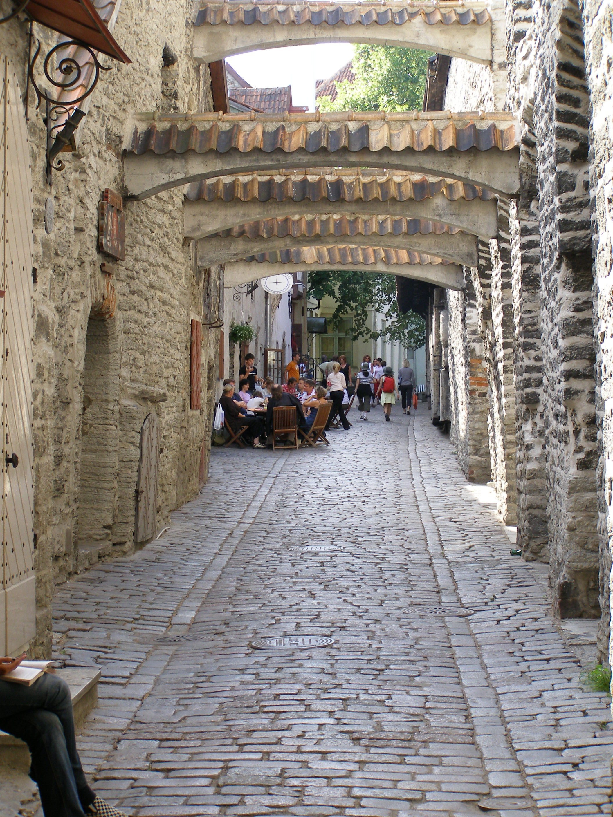 Tallinna vanalinn (Tallinn Old Town / Tallinn Altstadt / Tallin, staré město) Katariina Käik (Katariina Passage / Katariina-Gang / Kateřinina ulička)